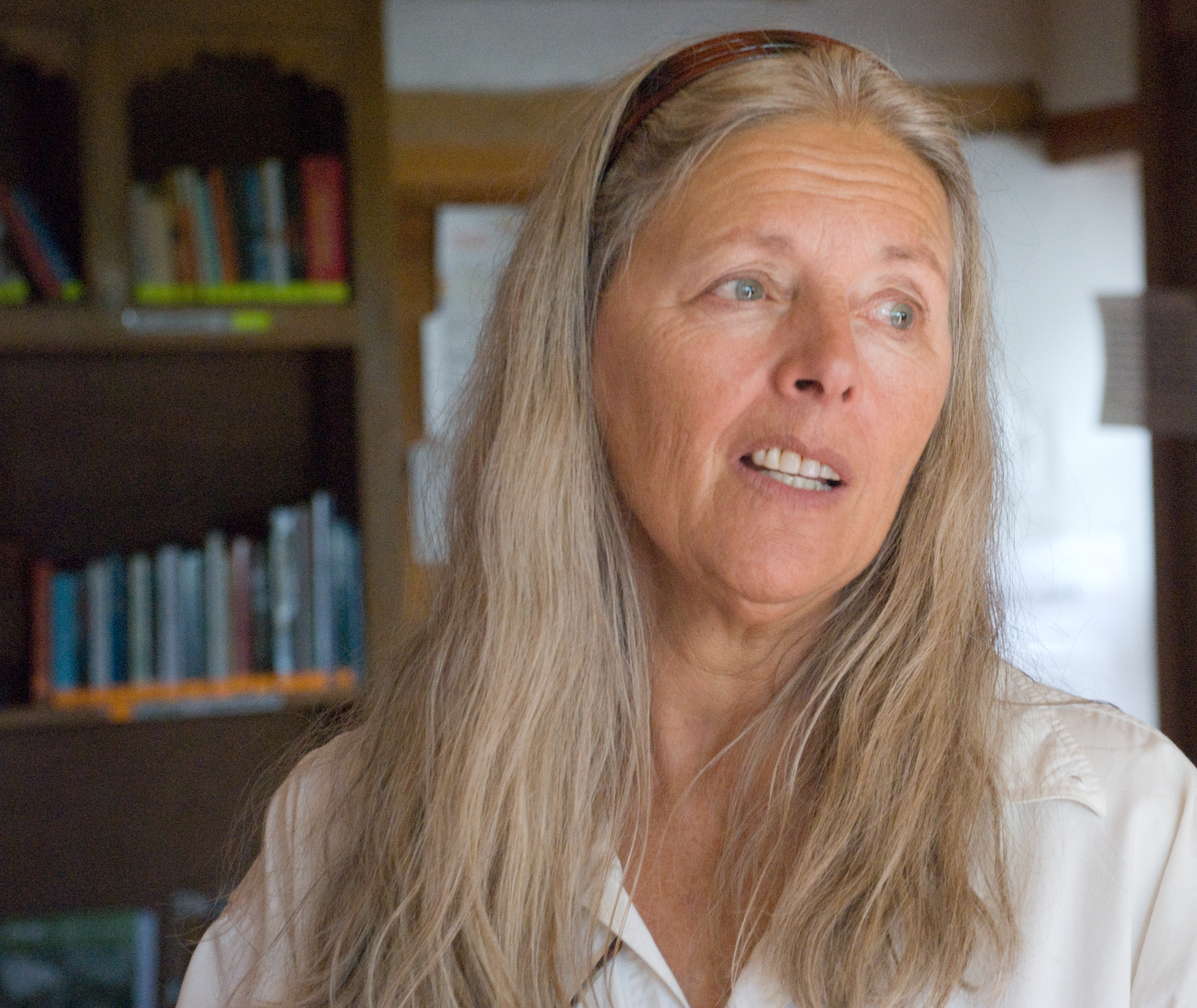 See